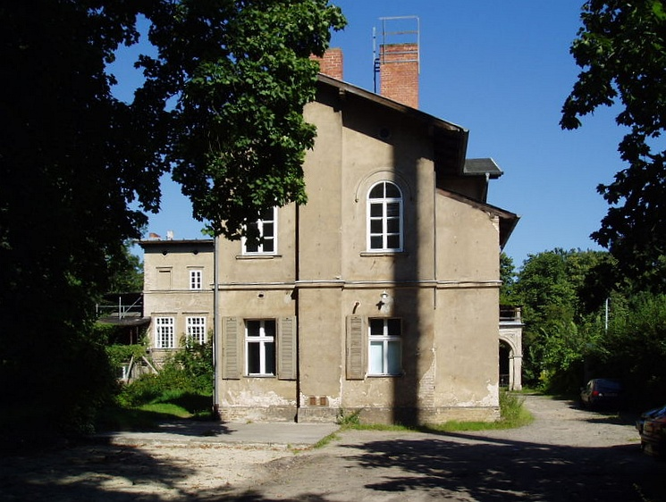 Villa Liegnitz (Südseite) im Park Sanssouci, Potsdam